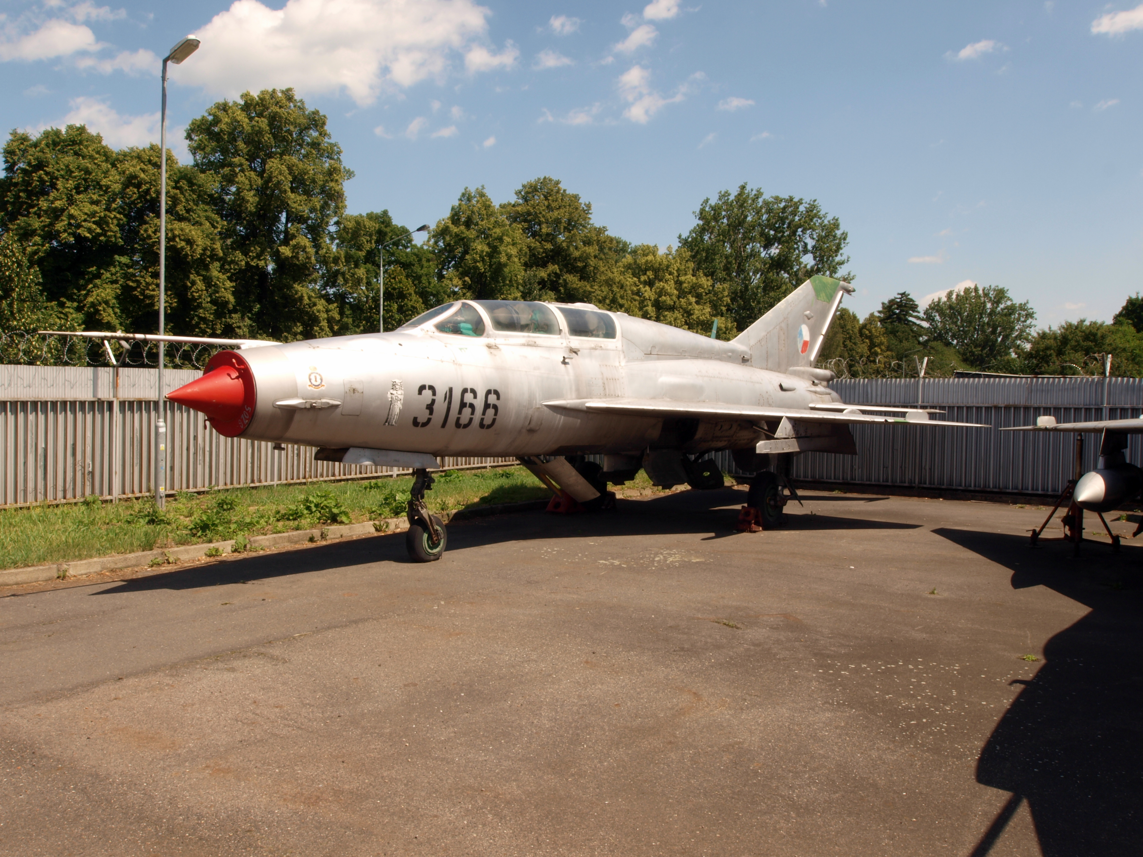 Mig-21UM Mongol B, 3166.